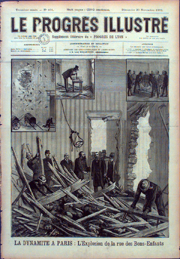 "La dynamite à Paris : l'Explosion de la rue des Bons-Enfants" Explosion du commissariat de la rue des Bons-Enfants